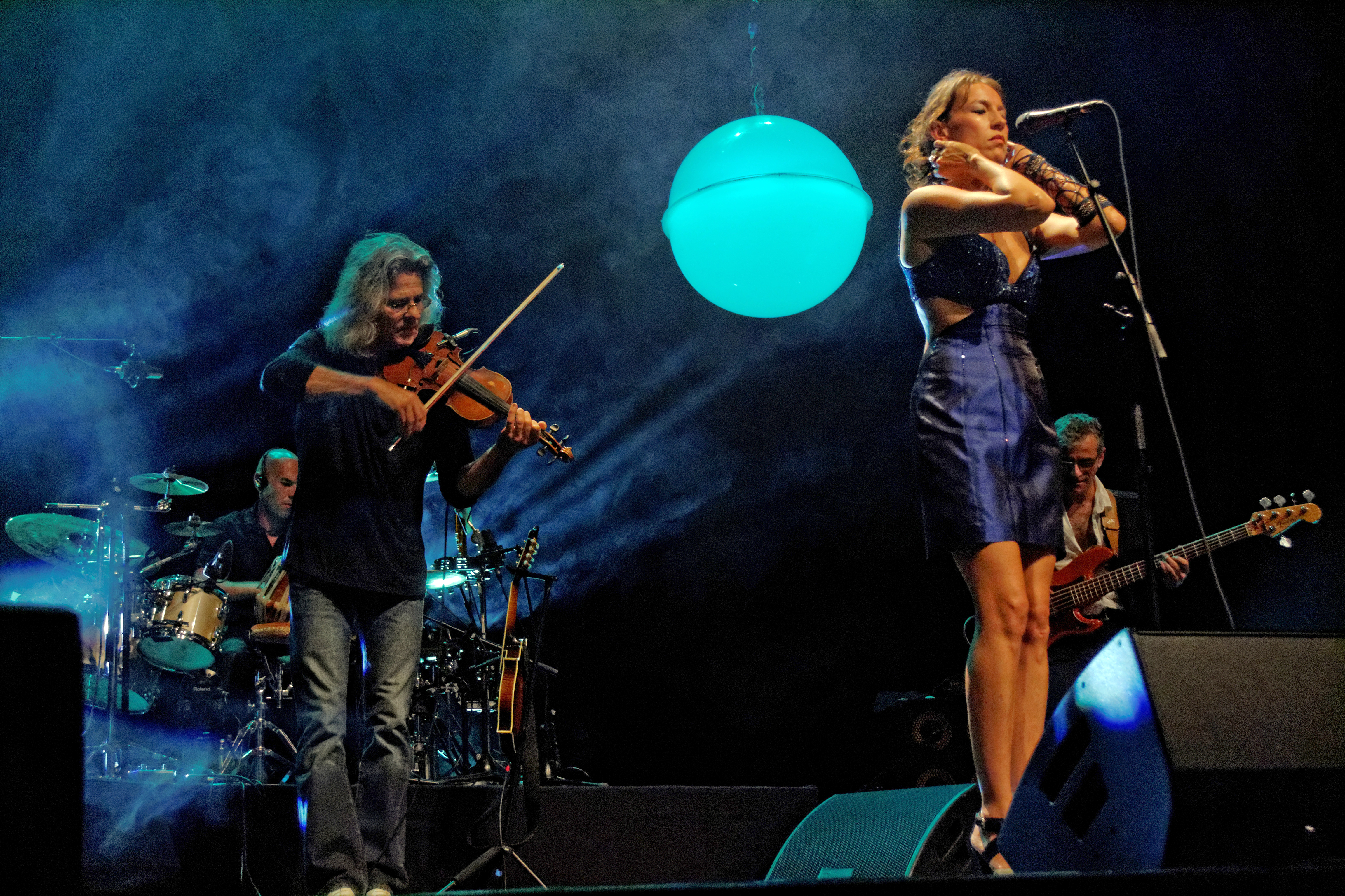 Robert Le Gall avec Gwennyn en concert au théâtre de Cornouaille lors du festival de Cornouaille à Quimper le 25 juillet 2014.